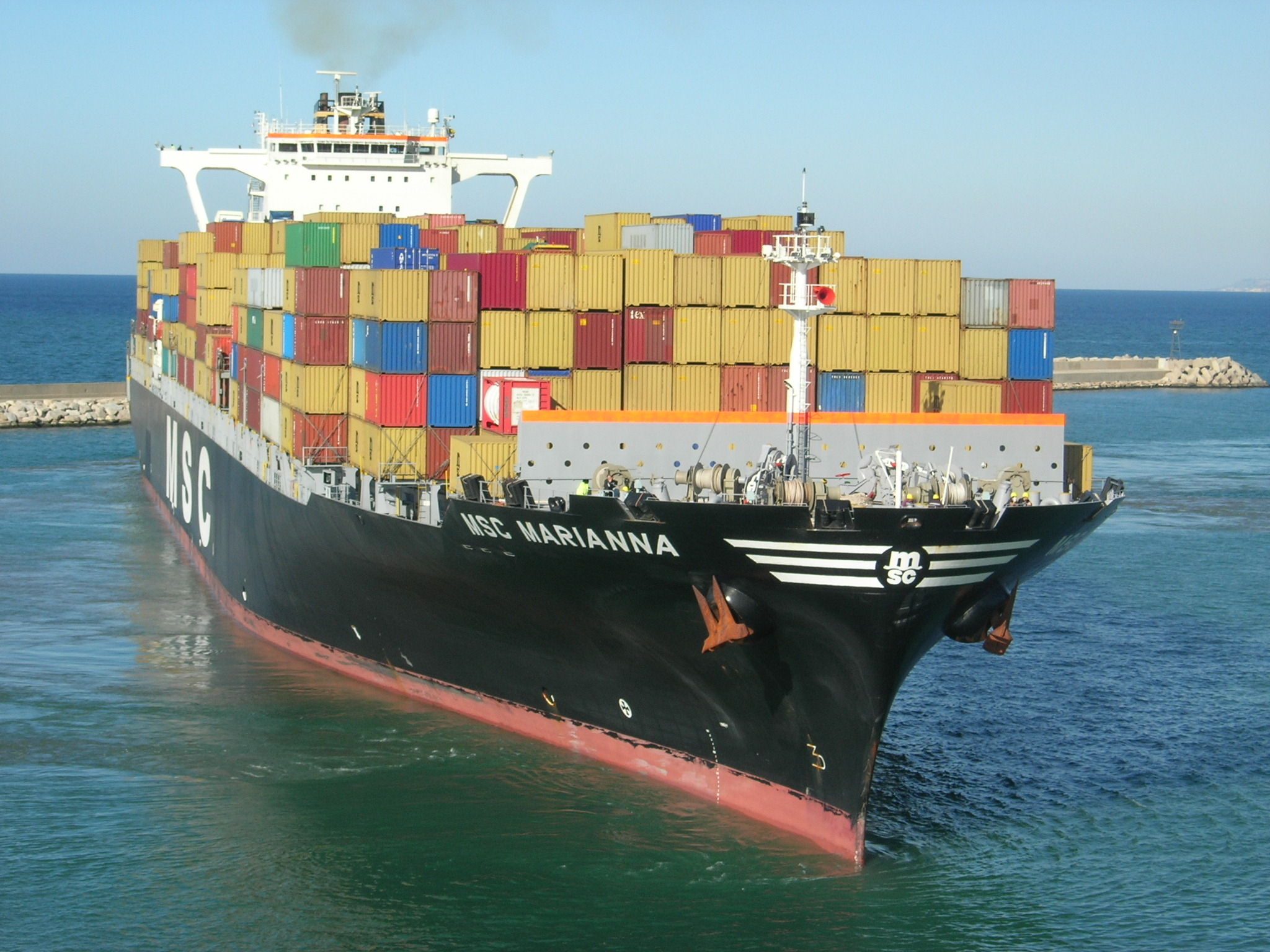 MSC Marianna im Hafen von Beirut Information about MSC Marianna may be found at IMO 9226920. A ship can change her name and flag state through time, but the IMO number remains the same through the hull's entire lifetime. Therefore, it's useful to identify a ship through her IMO number.